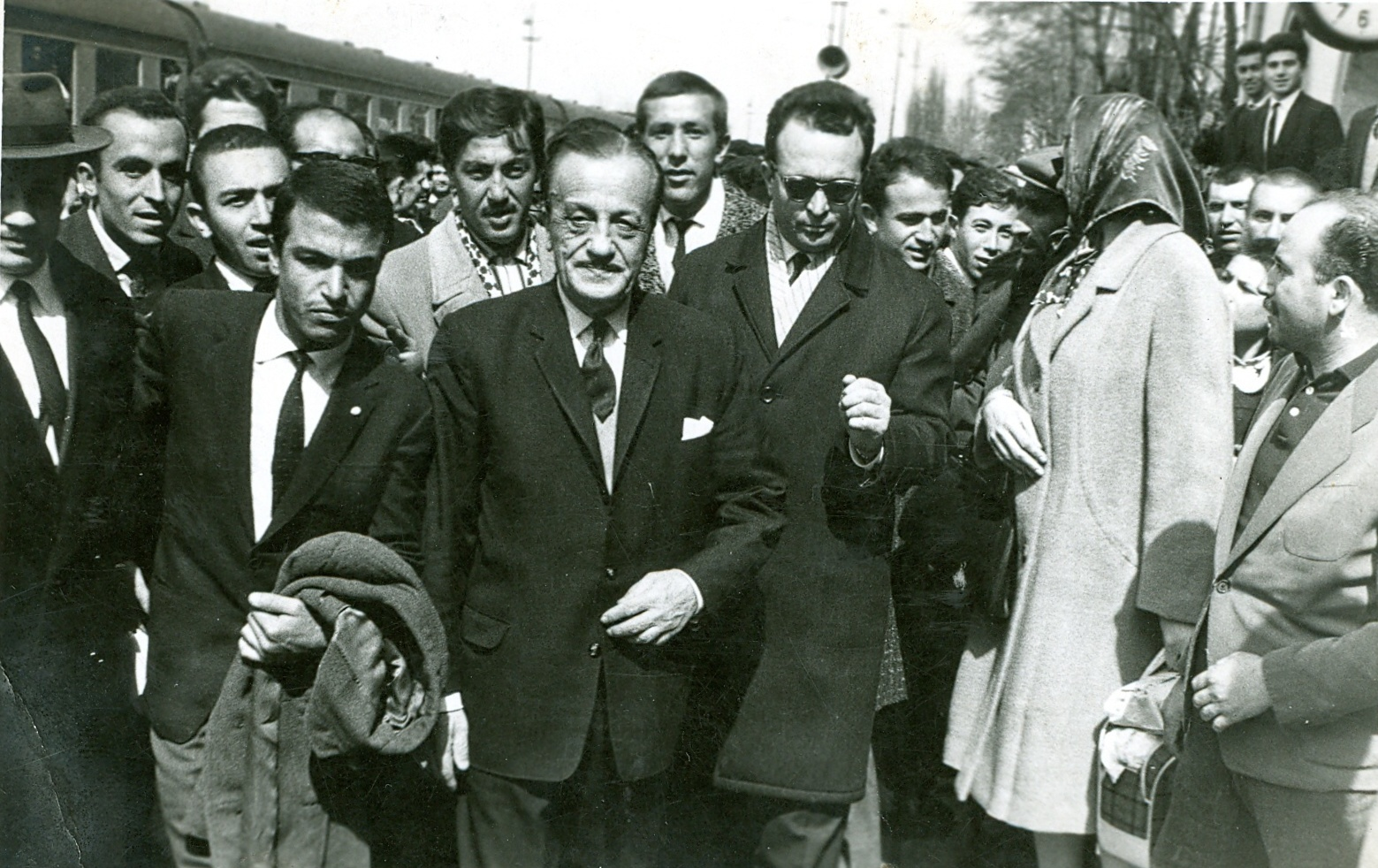 Necip Fazıl Kısakürek